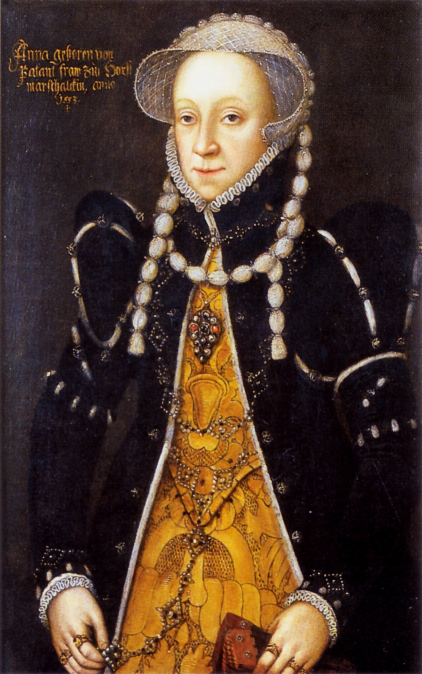 Porträt Anna von Palants, Ehefrau Rütger von der Horsts; Museum Renaissance-Schloss Horst